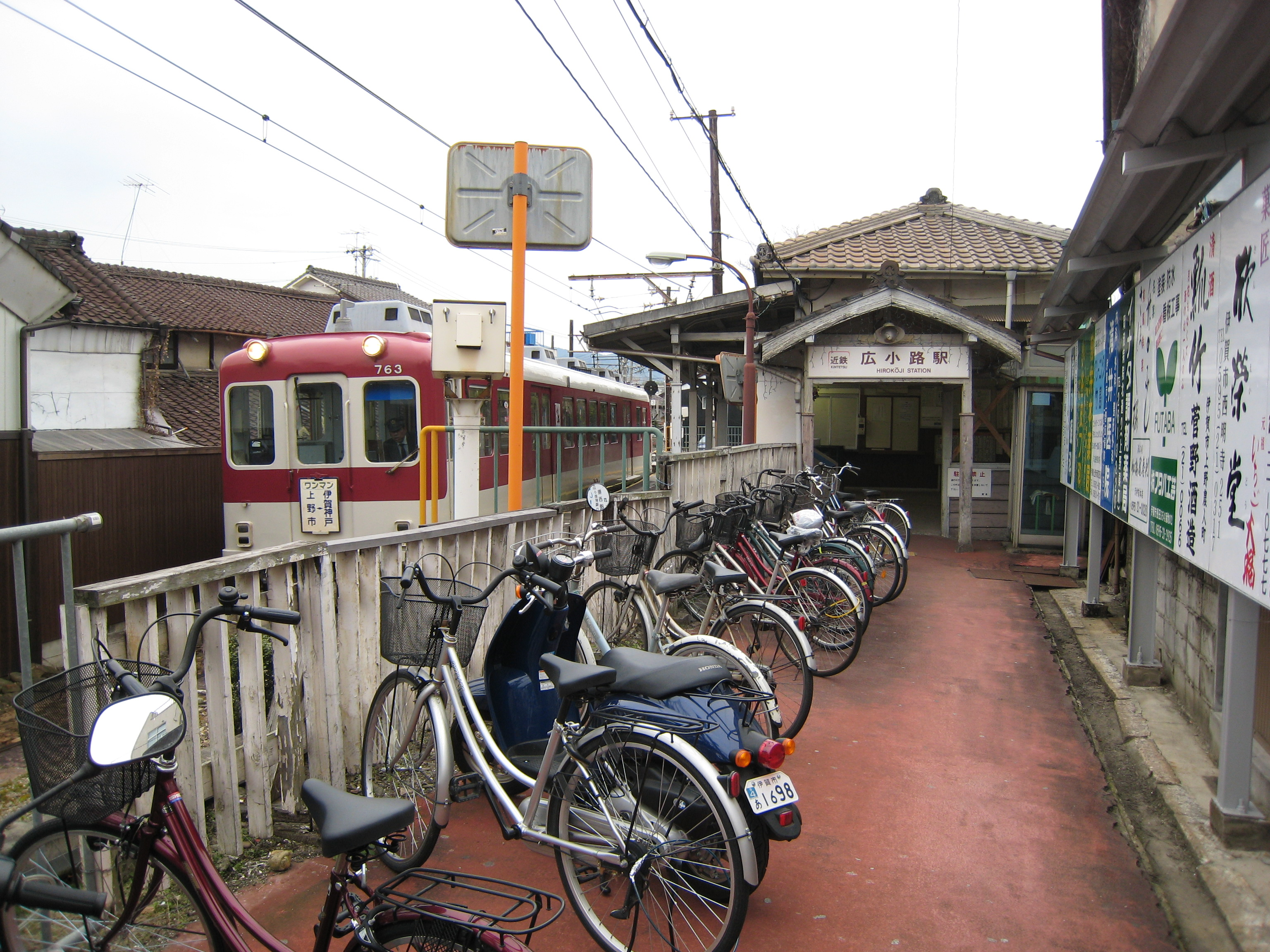 近鉄 広小路駅